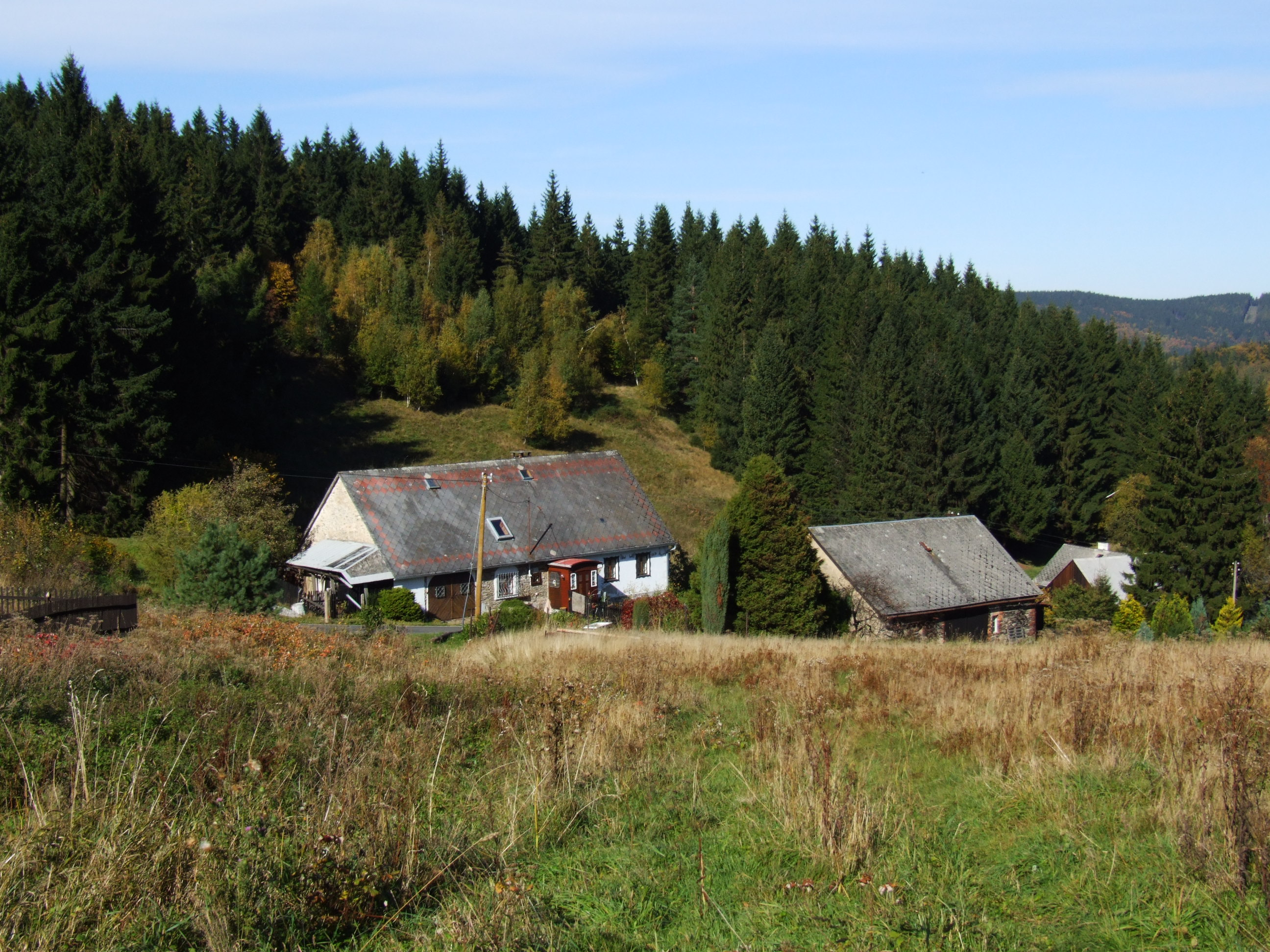 Zálesí (Valdek, něm. Waldek, Waldeck)